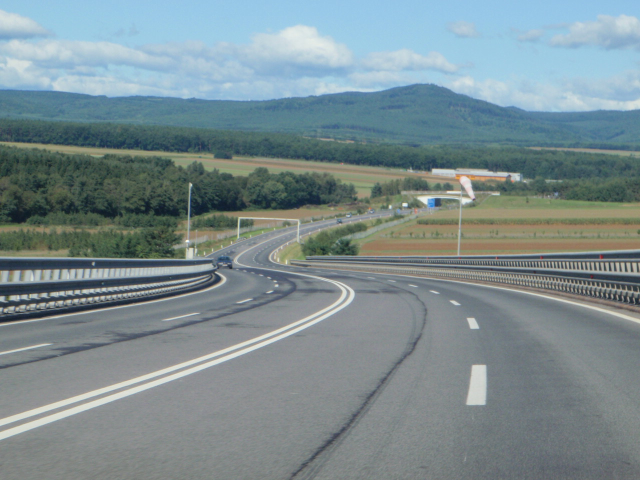 S31 Burgenland Schnellstrasse Richtung Neutal